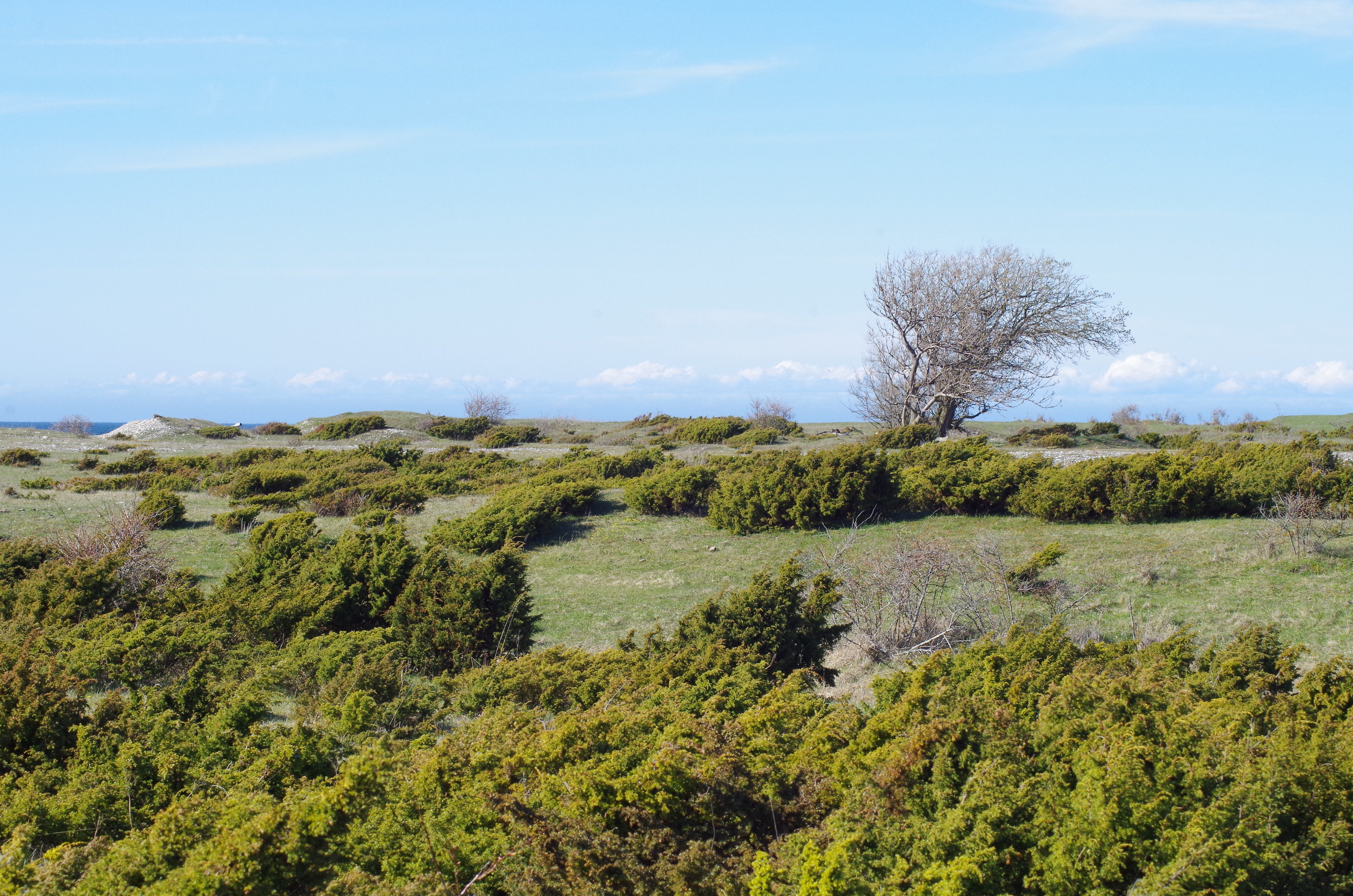 Osmussaare vaade